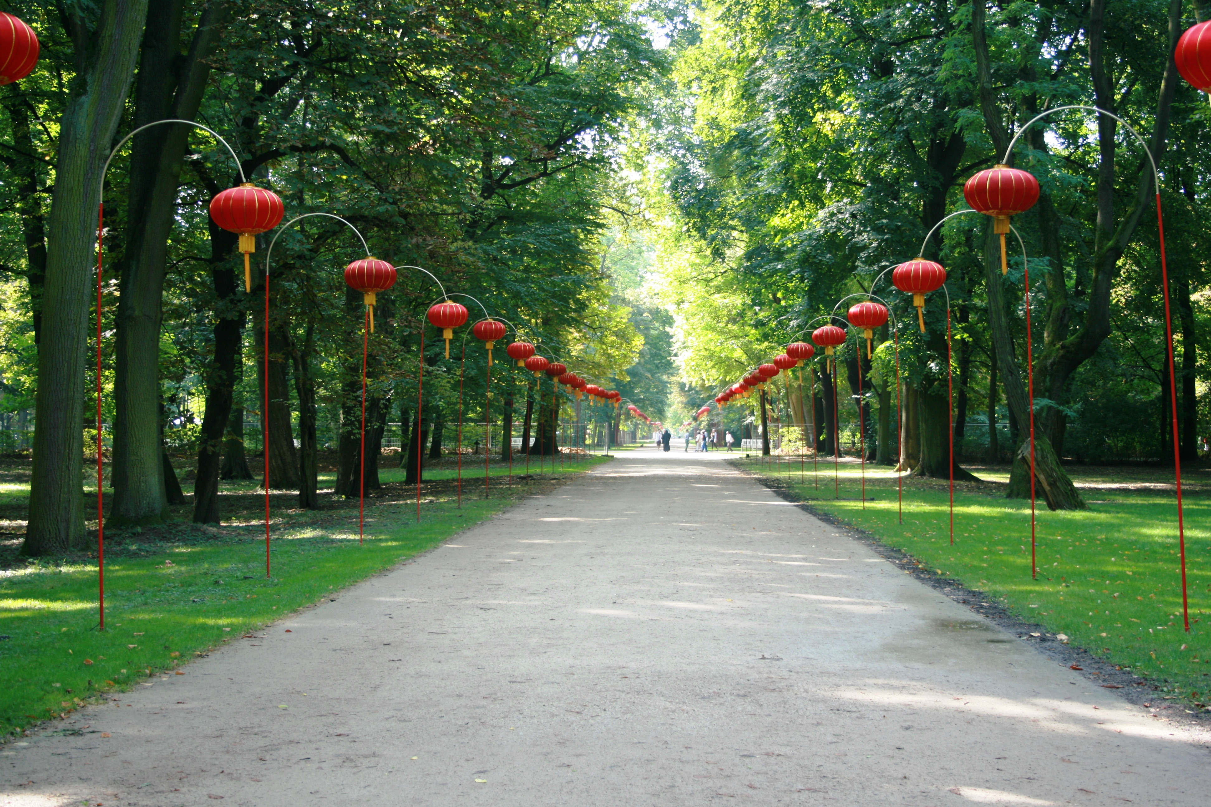 Chińska Aleja w czasie III Festiwalu lampionów chińskich